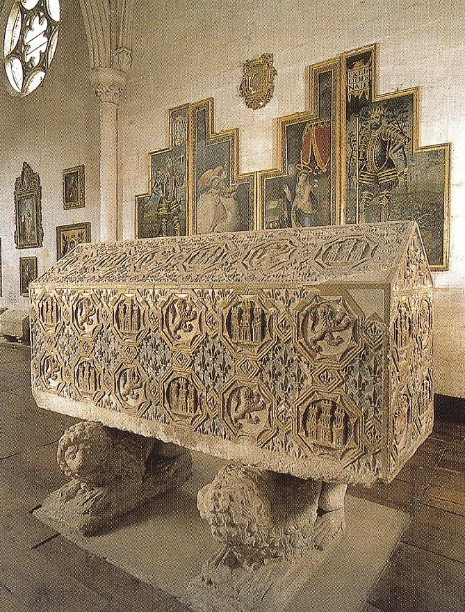 Sepulcro de Alfonso de la Cerda «el Desheredado» (1270-1333), hijo del infante Fernando de la Cerda y nieto del rey Alfonso X de Castilla. El sepulcro se encuentra en el monasterio de las Huelgas de Burgos, y en el mismo monasterio se encuentra el sepulcro de su padre, el infante Fernando de la Cerda.